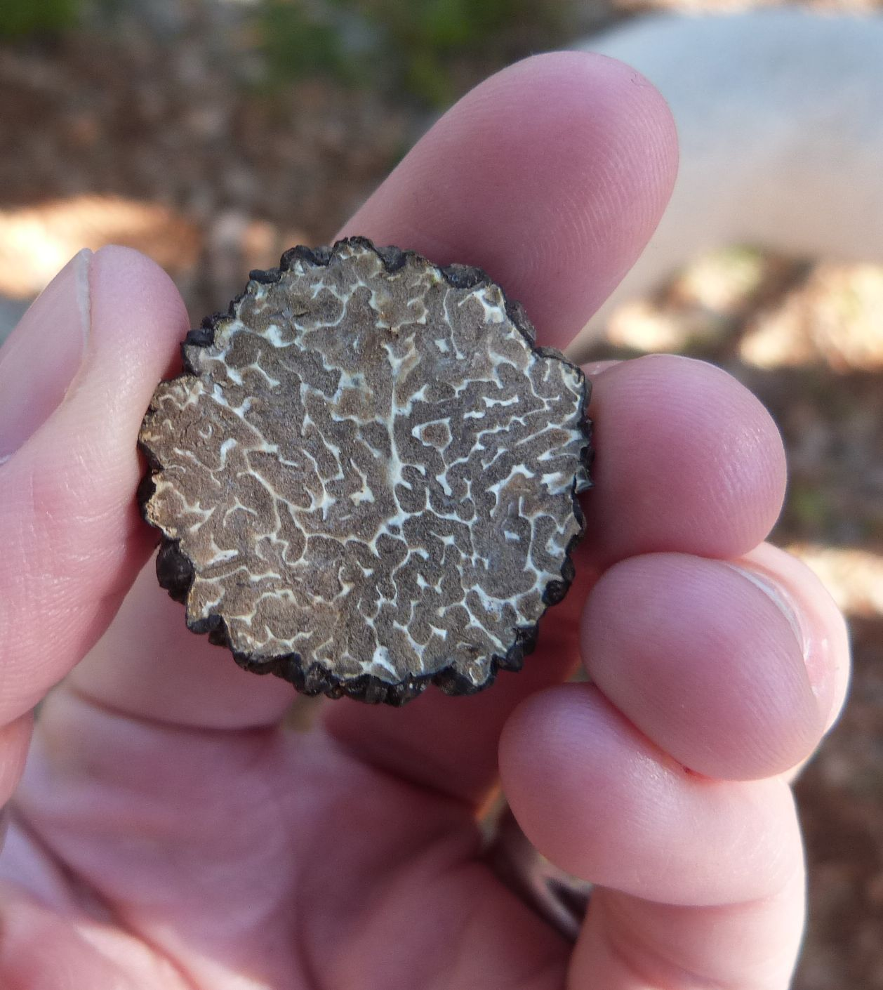 Truffière de Lalbenque : une truffe d'été.